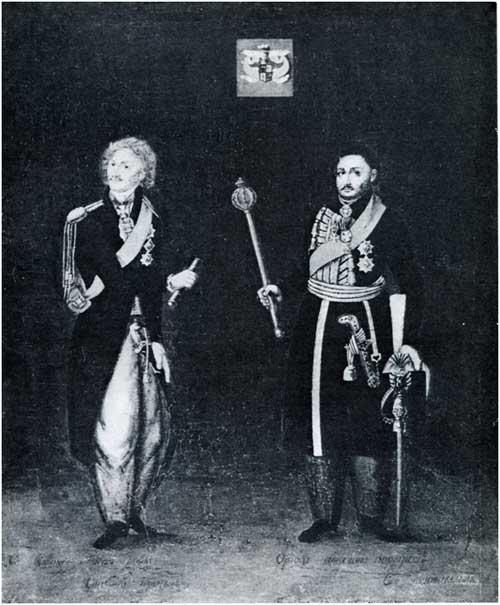 Портрет войскового атамана В.П. Орлова и графа Ф.П. Денисова. Неизвестный художник XIX века. Холст, масло. 60X80 см. Новочеркасский музей истории донского казачества. Надпись на подрамнике: «Собрание портретов донских деятелей в Атаманском доме». Находился в Донском музее, Национальном музее в Праге. Федор Петрович Денисов (1738-1803 года) — донской казак. Наказной атаман Войска Донского. На военной службе с 1756 года. В 1787 году — генерал-майор, в 1798 — генерал от кавалерии. Награжден орденами Святого Георгия IV степени (1778 год), III степени (1789 год) и II степени (1794 год), Святого Александра Невского, Святой Анны I степени, Святого Владимира III и II степени. Кроме этого, получил награды: бриллиантовое перо с вензелями императрицы, в 1799 году — графский титул и герб. Иностранные ордена: прусский — Красного Орла и польские — Белого Орла и Станислава.